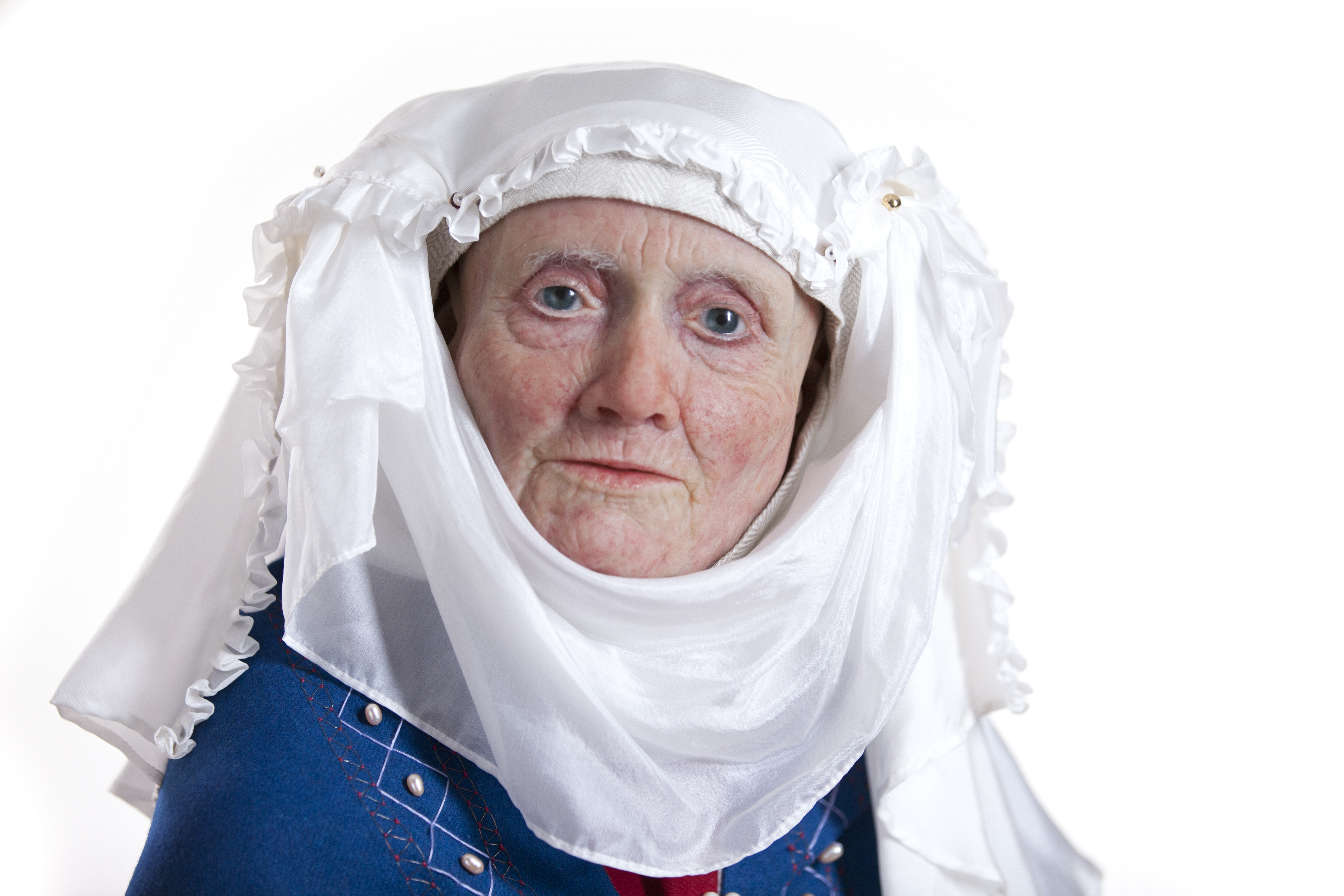 Hillegonda van Voorne, gezichtsreconstructie op basis van haar skelet, collectie Provinciaal depot voor archeologie Noord-Holland, Huis van Hilde, Castricum, inventarisnummer R9560-02.